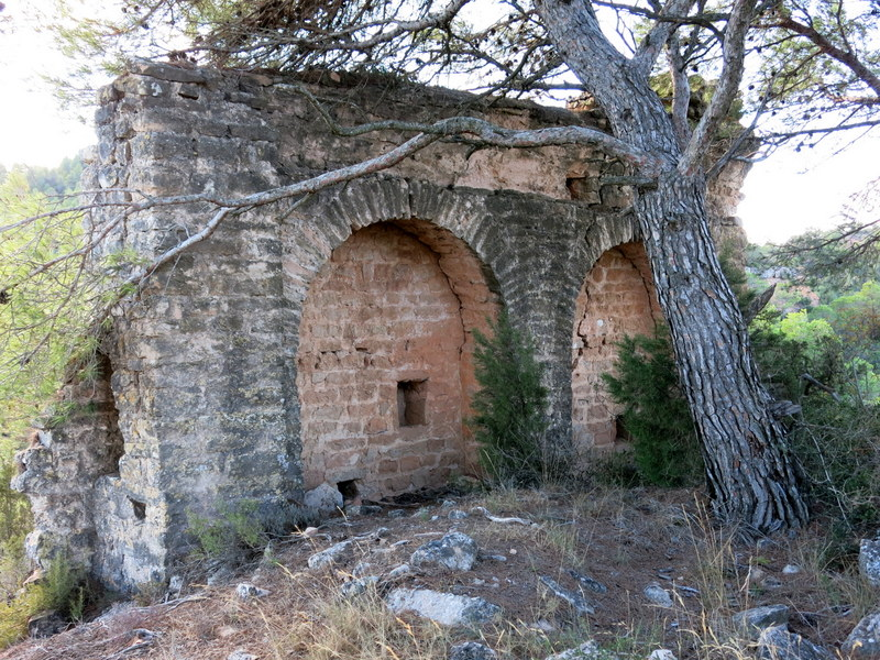 castell La Roqueta- Sant Martí de Tous